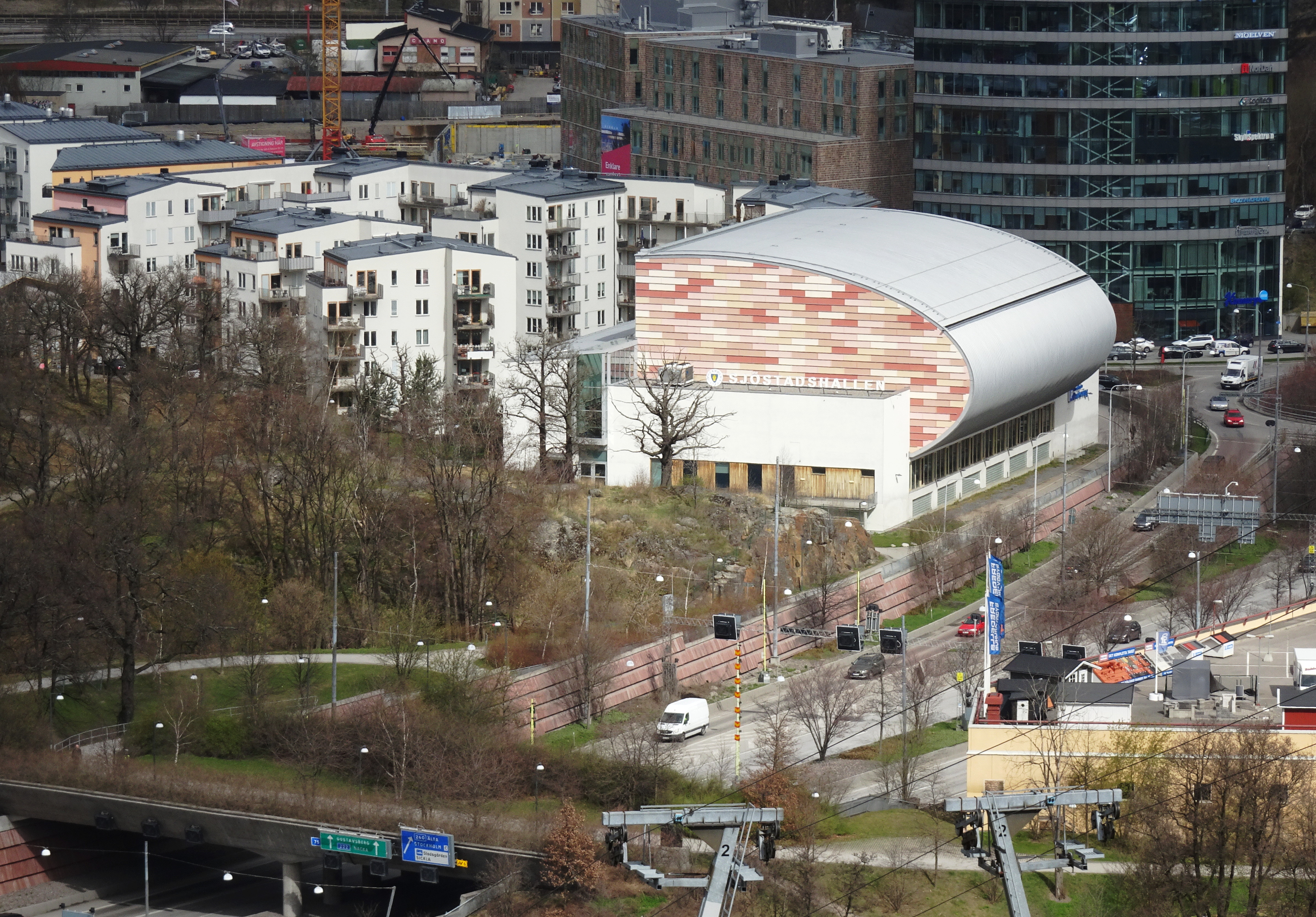 Sjöstadshallen, Hammarby Sjöstad, arkitekt Brunnberg & Forshed